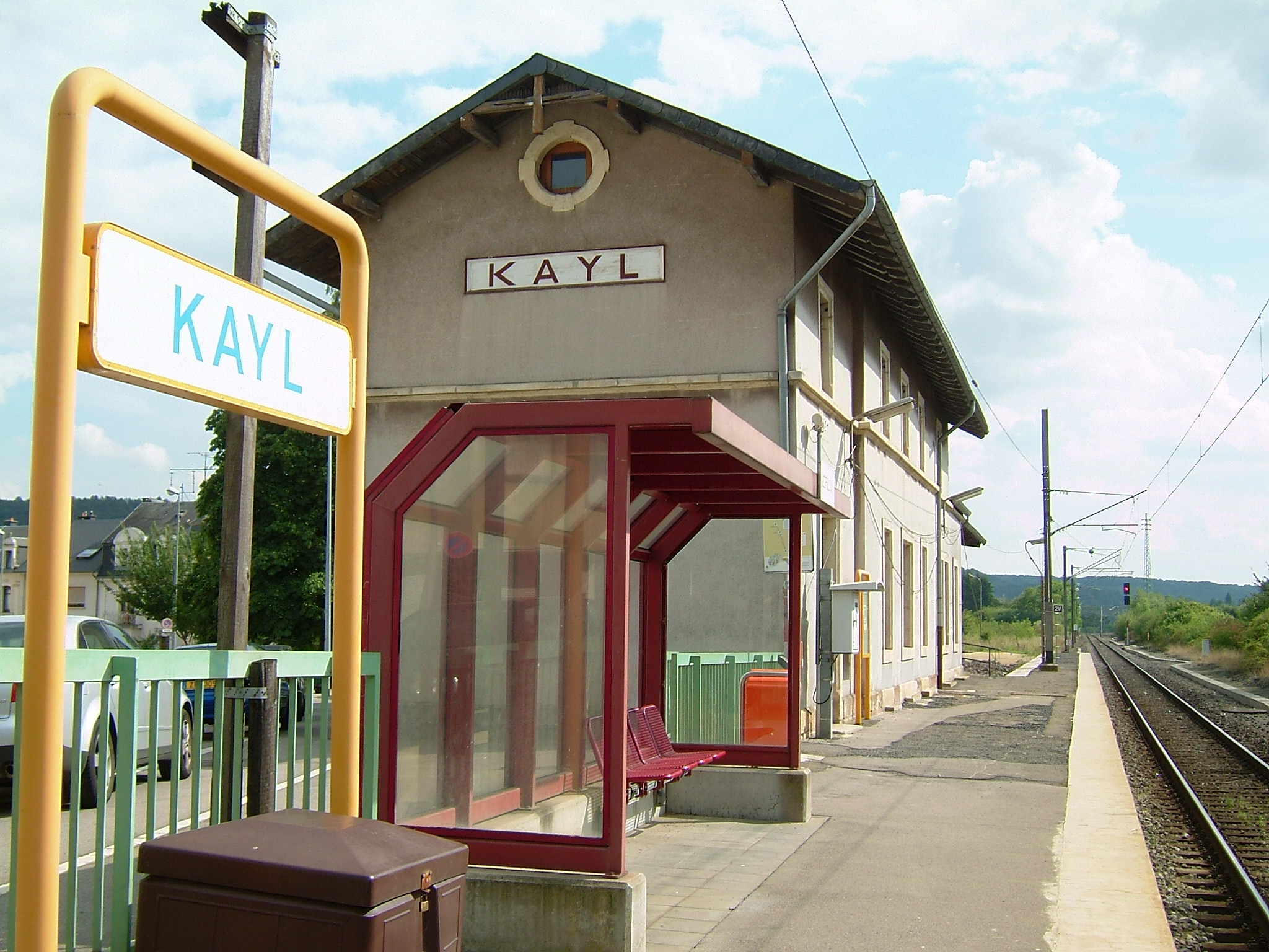 Gare Käl.